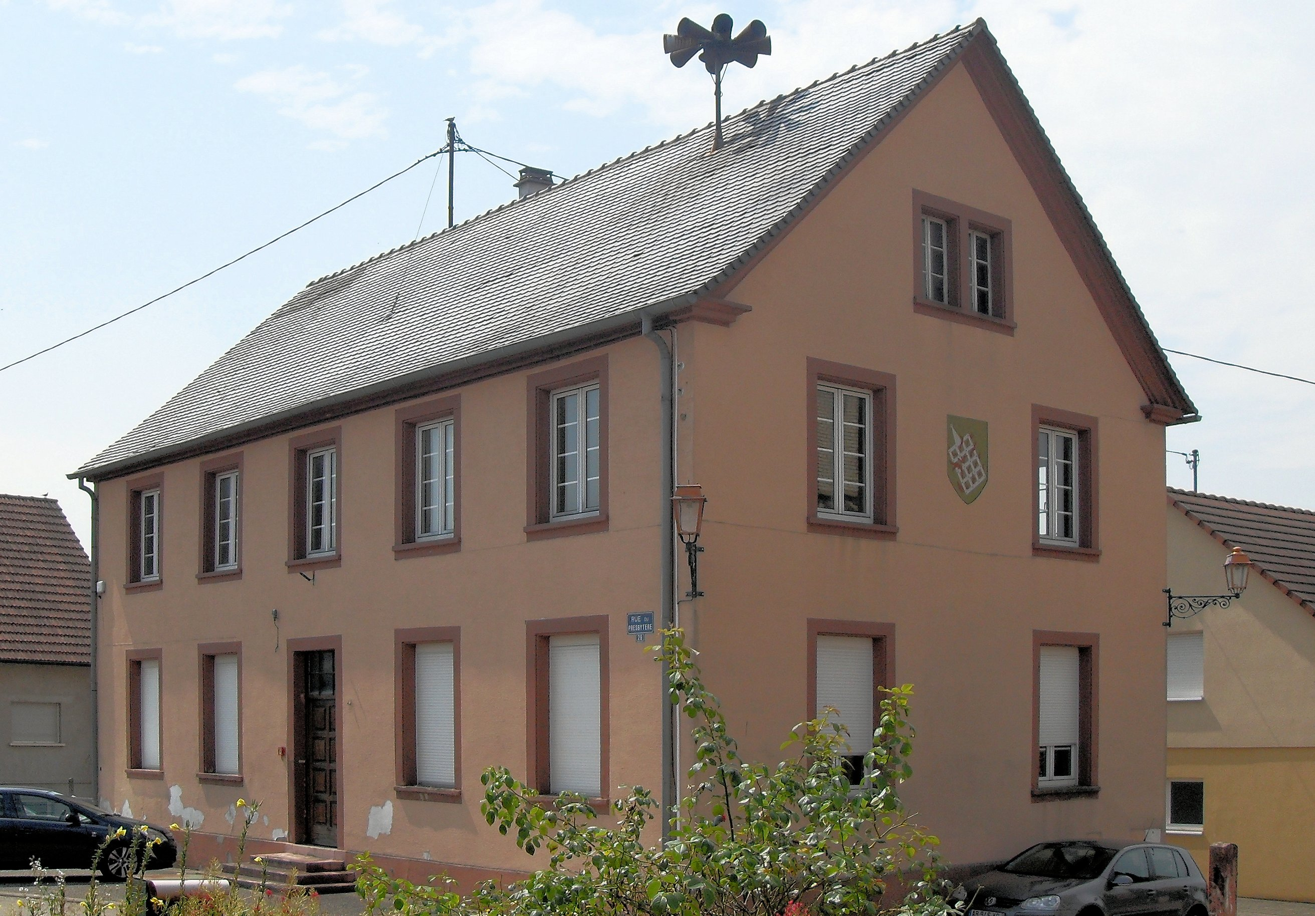 La mairie de Siegen